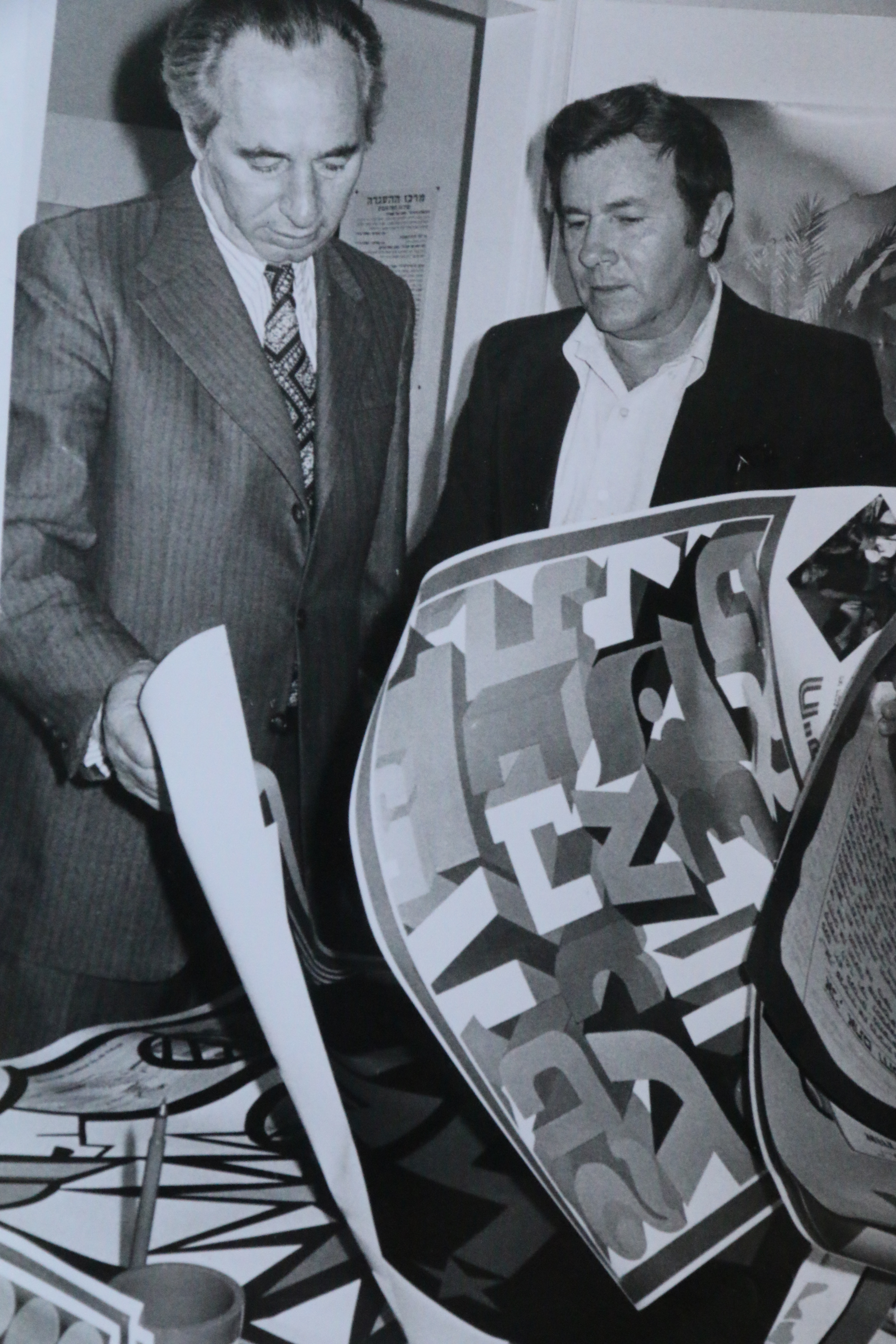 שר ההסברה שמעון פרס ביחד עם מנכ״ל מרכז ההסברה מר יהודה אילן, עוברים ביחד על כרזה לכבוד ארועי 26 שנה למדינת ישראל 1974